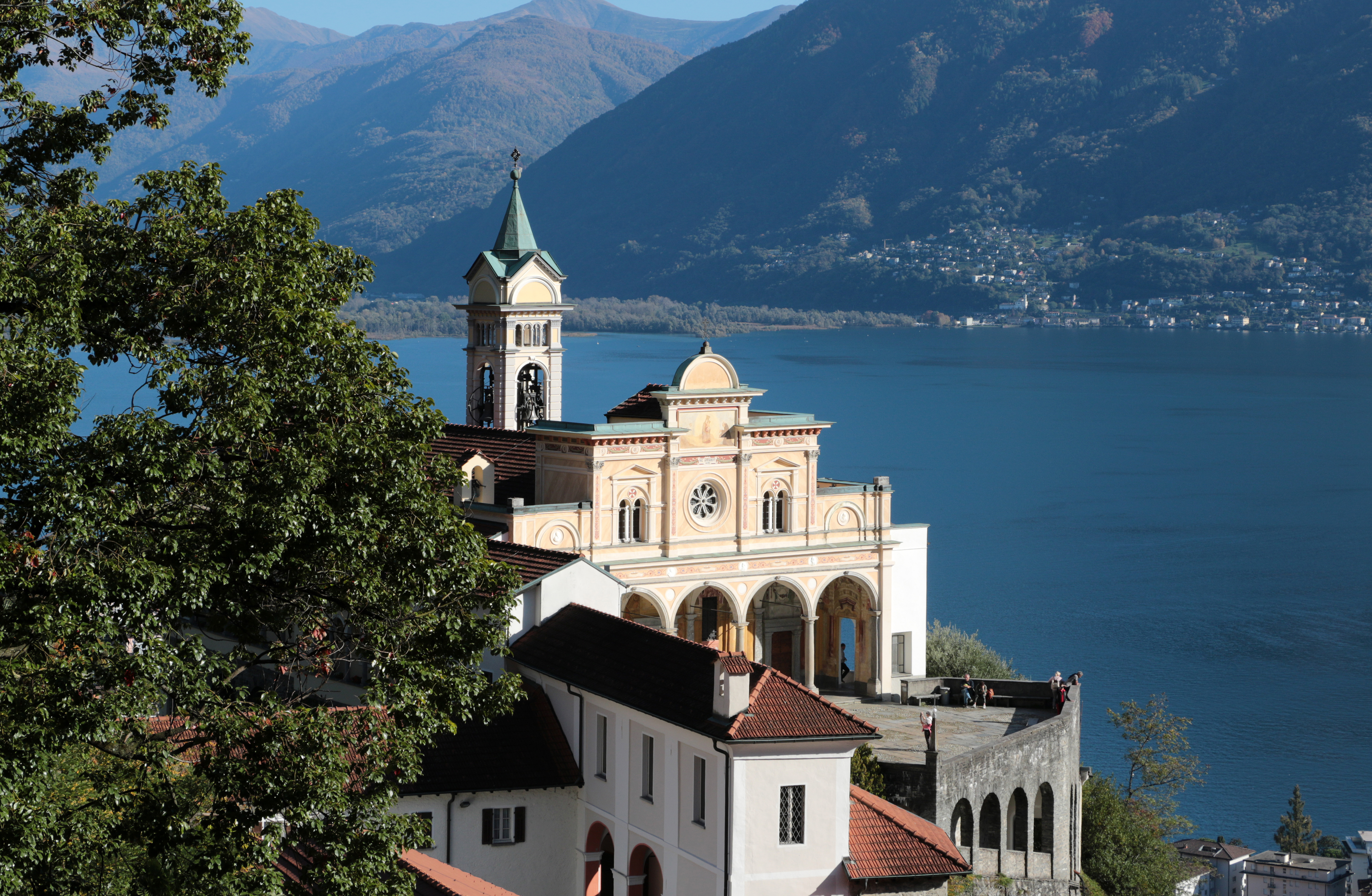 Santuario della Madonna del Sasso Orselina (Locarno) - Svizzera